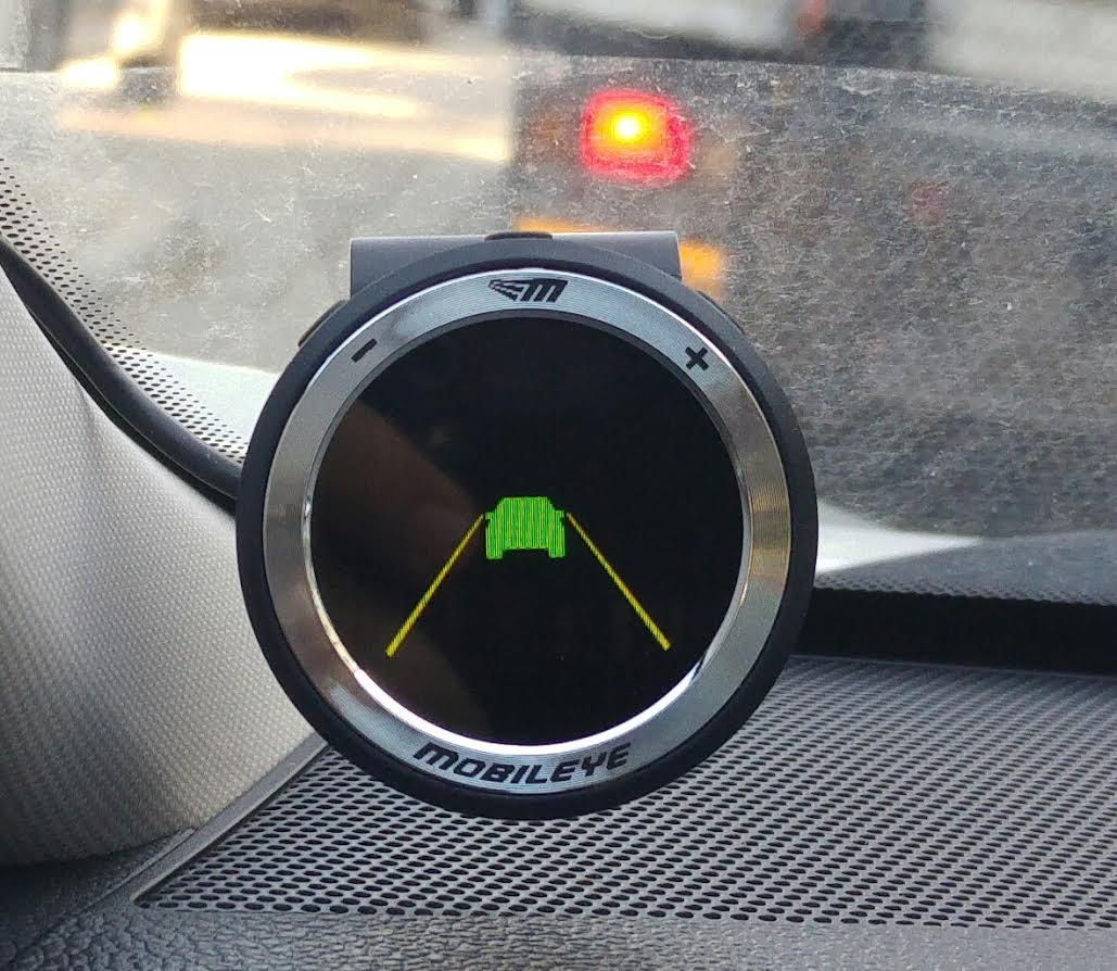 מסך נהג של מובילאיי